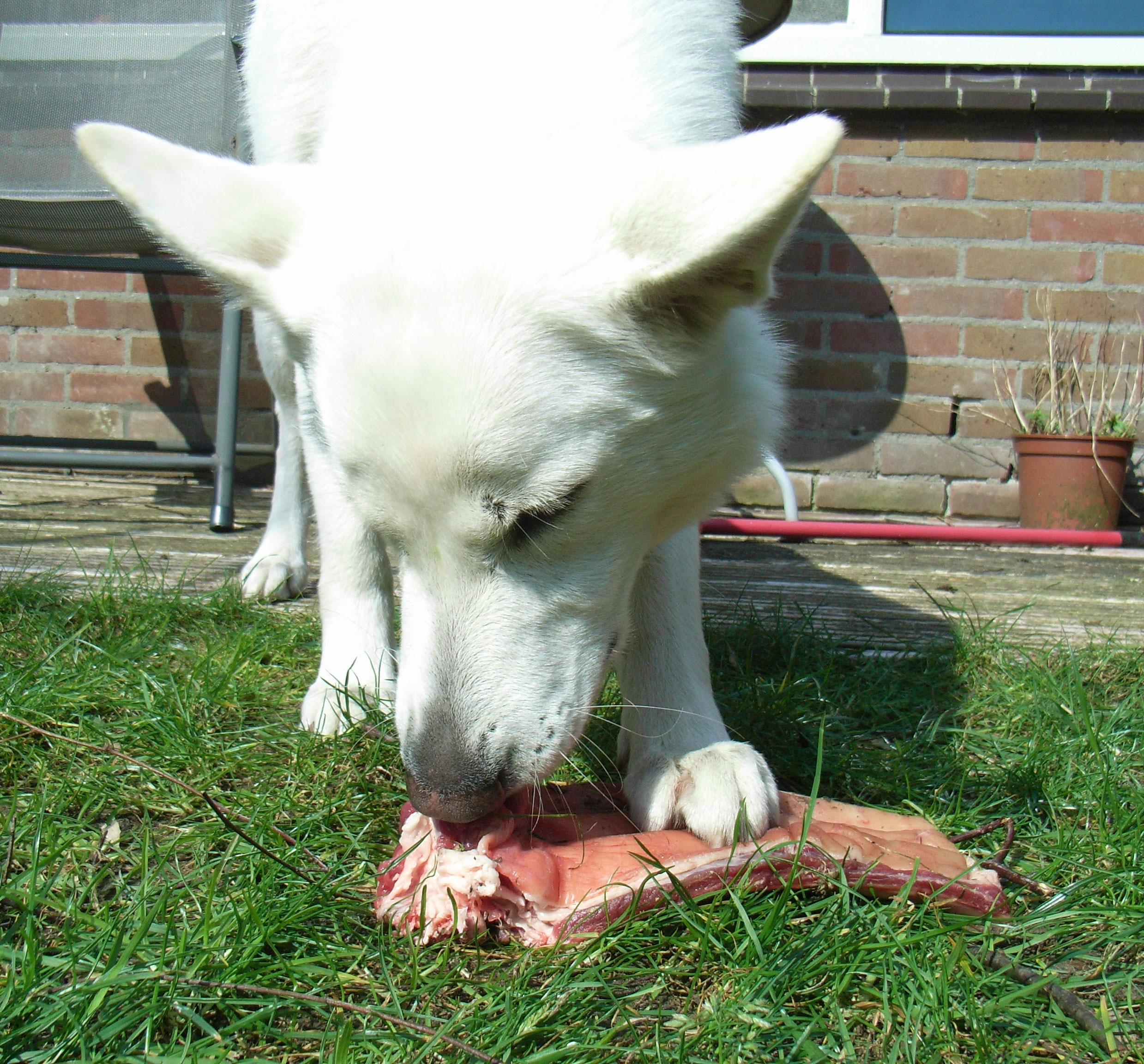 Dit is een eigengemaakte foto van eigen hond.